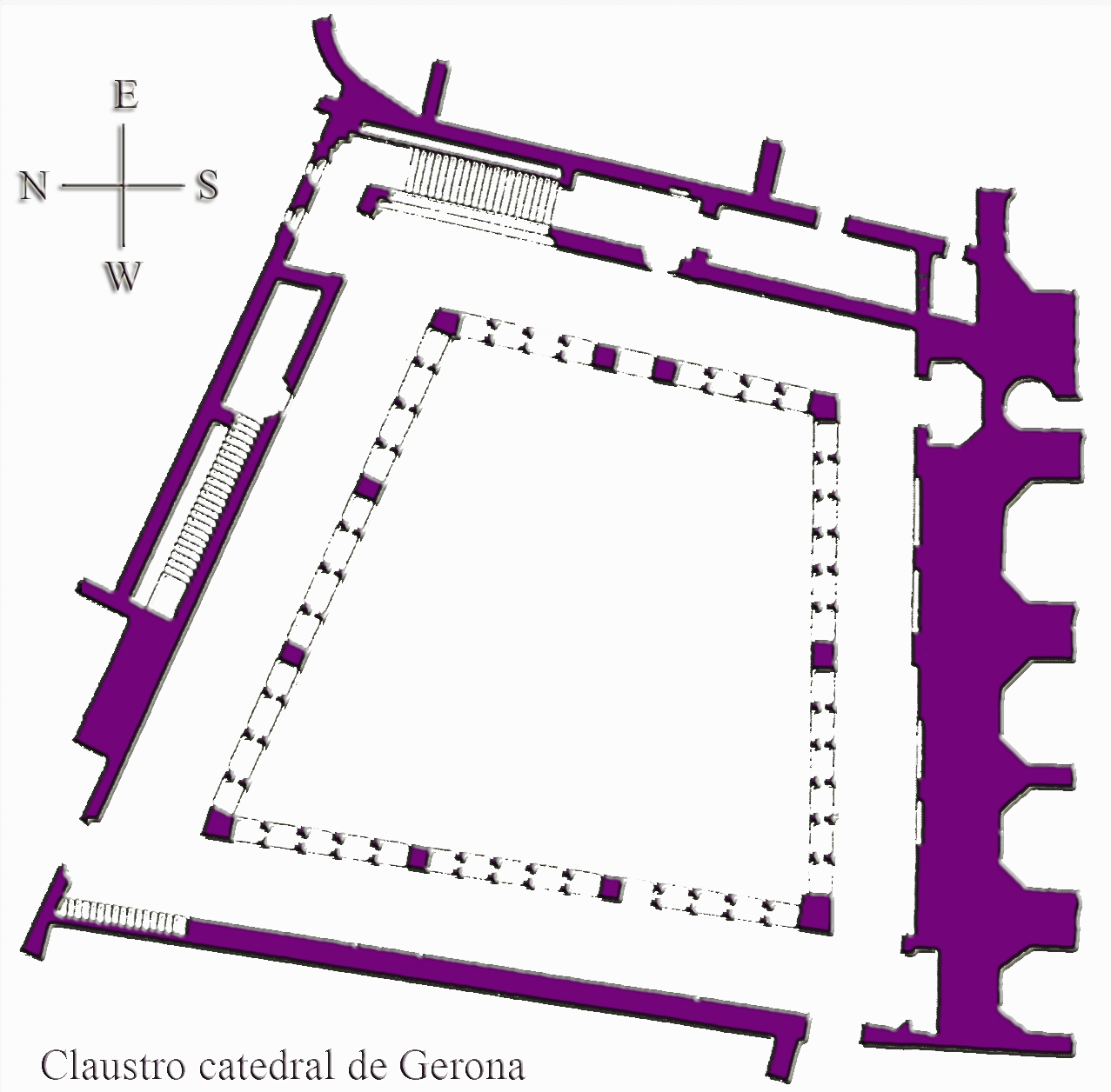 Claustro de la Catedral de Gerona ( España )